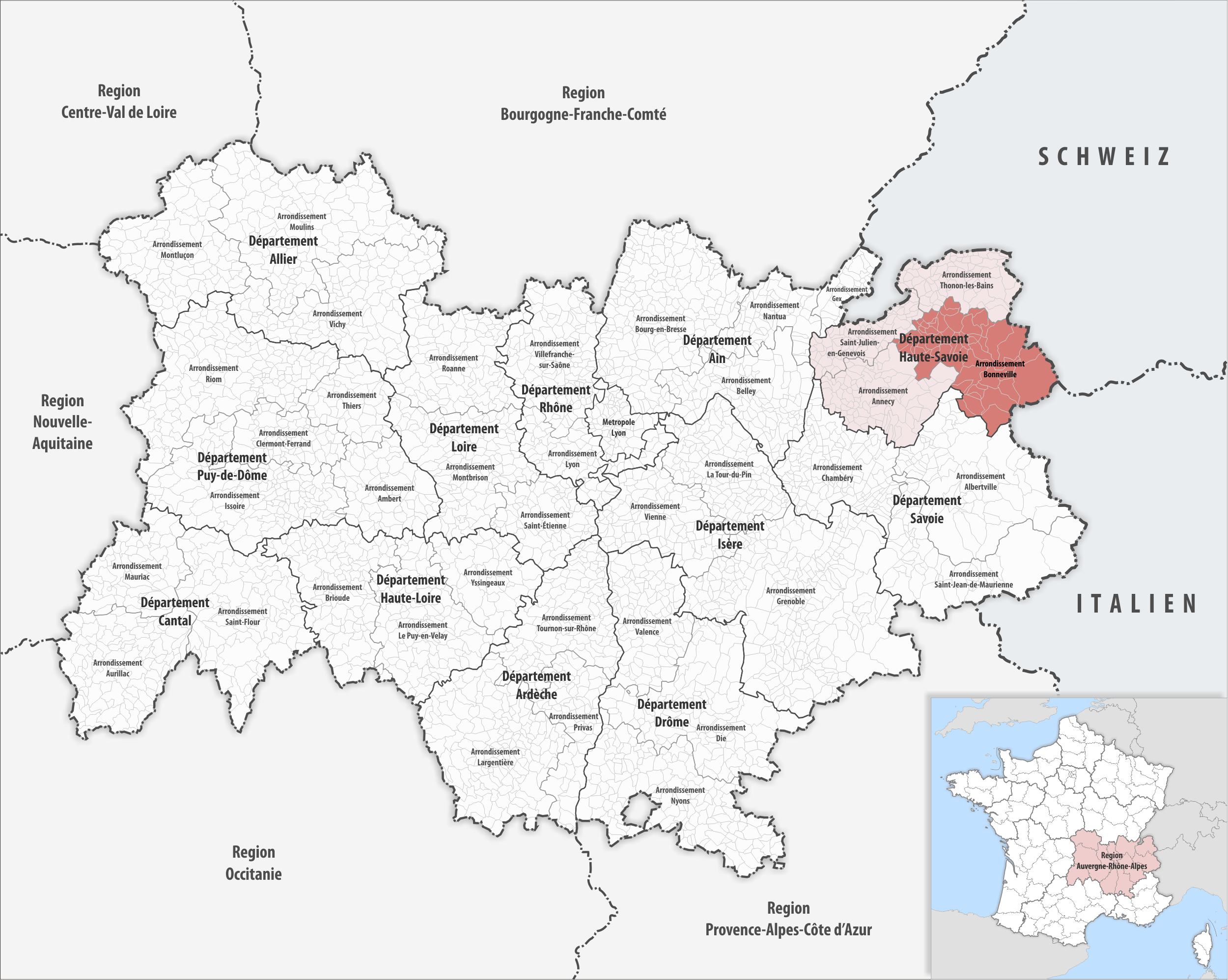 Lage des Arrondissements Bonneville